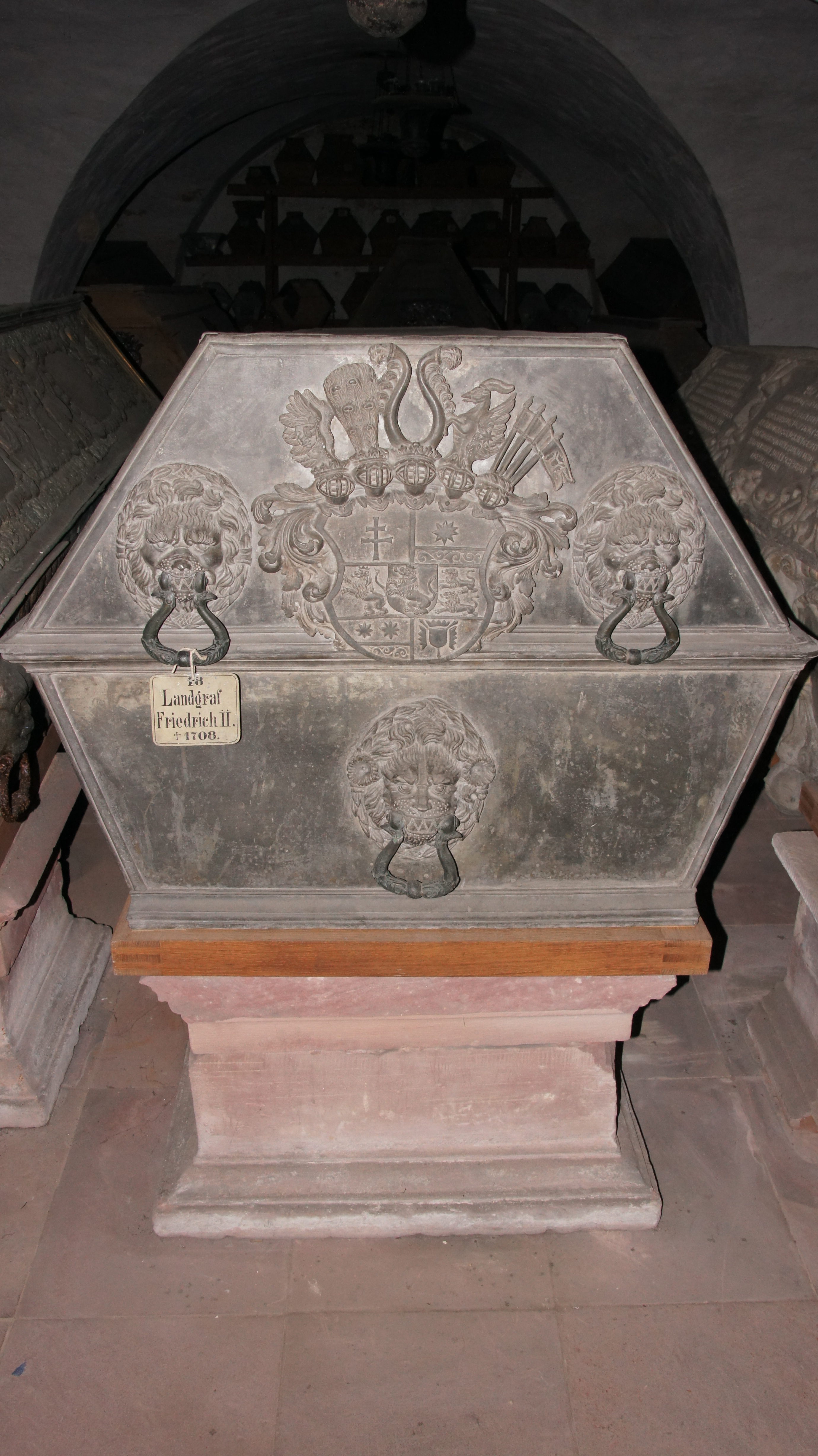 Bad Homburg vor der Höhe, Schloss, Gruft, Landgraf Friedrich II